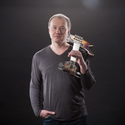 бас-гитара